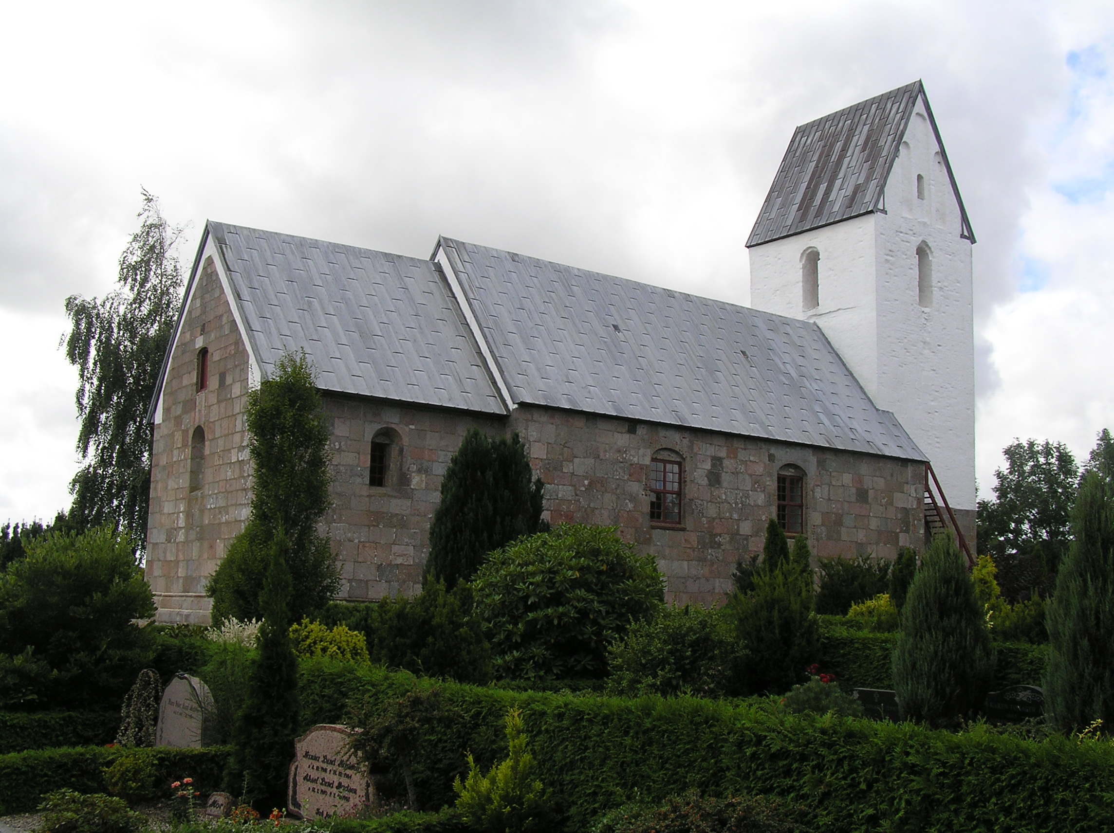 Vinding Kirke (Viborg Stift) - Vinding Church, Denmark